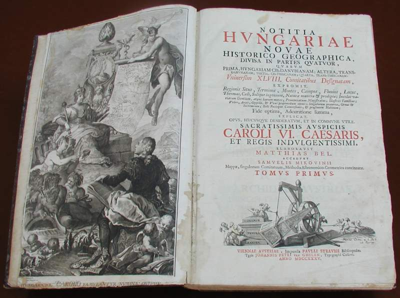 Notitia Hungariae Novae Historico Geographica első kötetének címlapja